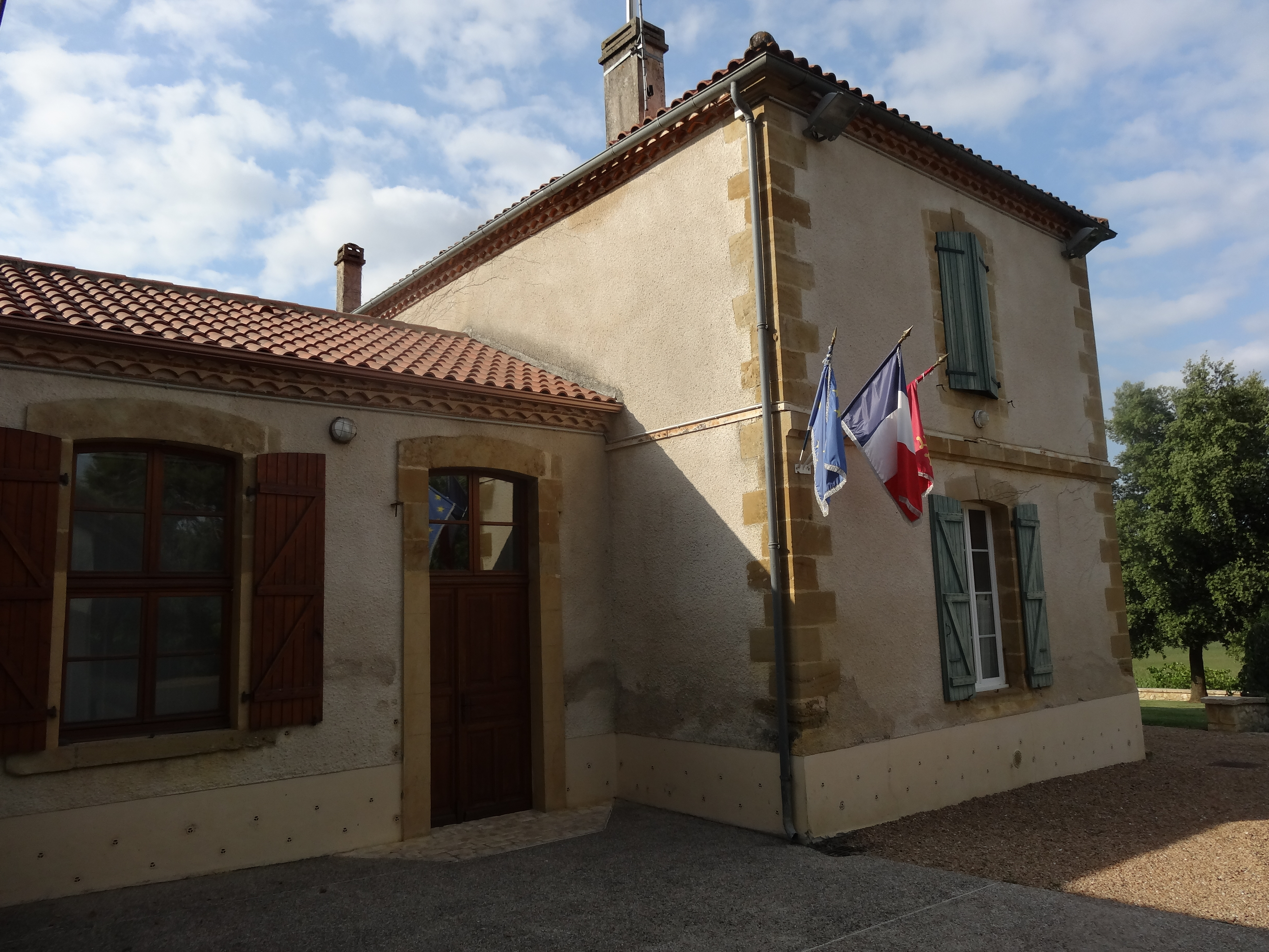 La mairie de Ricourt.